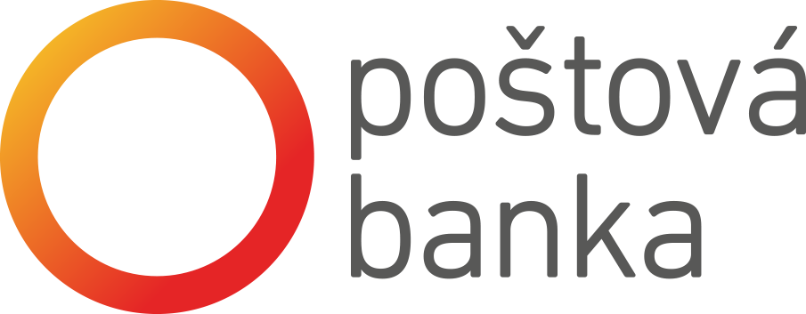 Logo Poštovej banky